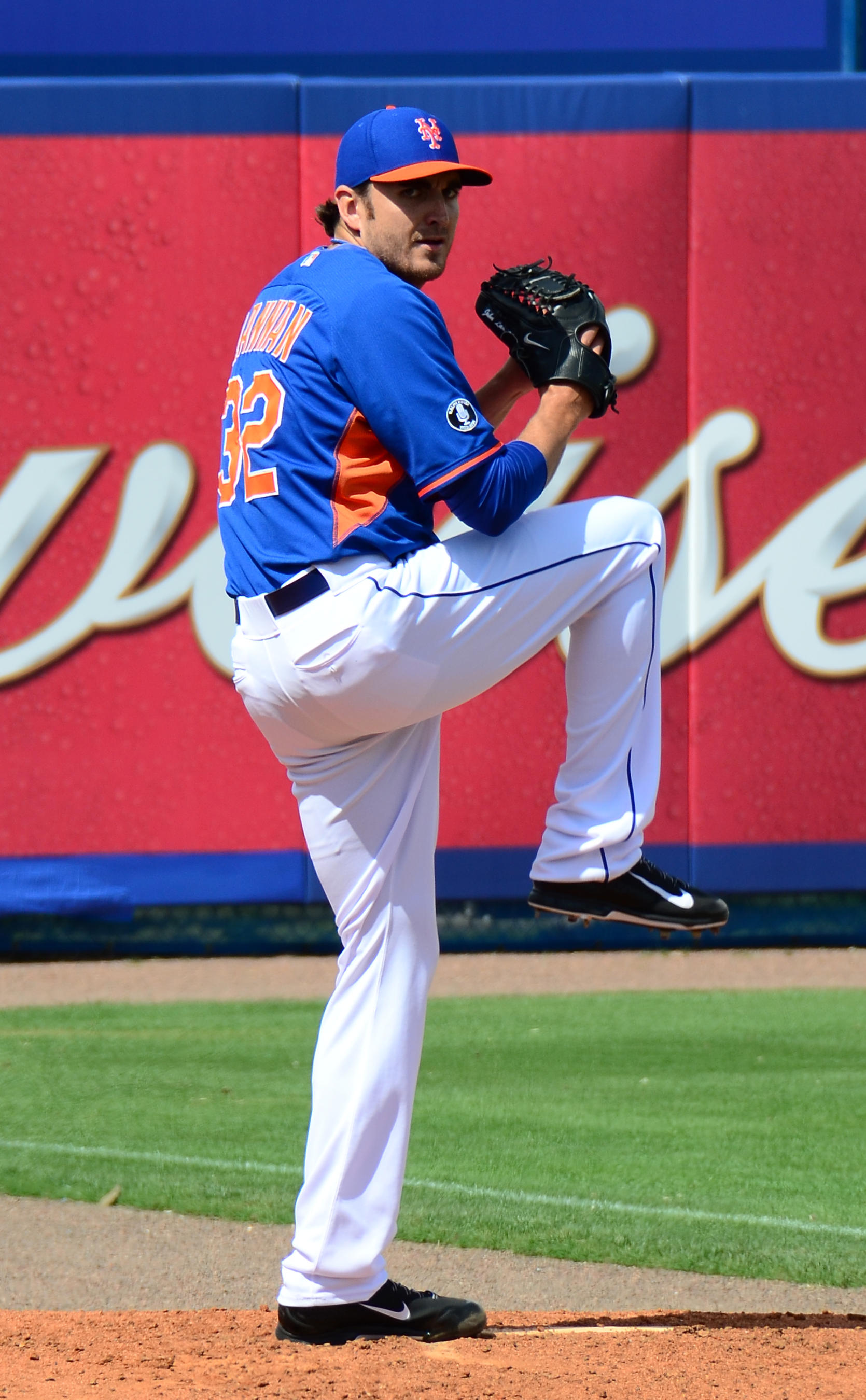 John Lannan